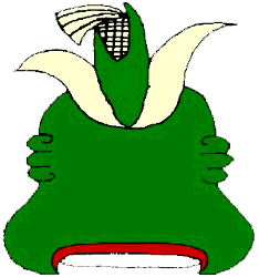 Glifo de Eloxochitlan